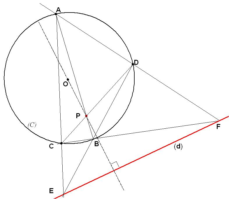 construction de la polaire d'un point par rapport à un cercle en utilisant les propriétés du quadrilatère complet.